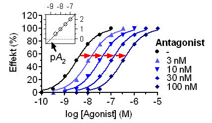 Kompetitive Hemmung des Effekts eines Agonisten durch steigende Konzentrationen eines Antagonisten. Die Potenz eines Antagonisten kann als pA2-Wert über die Antagonisten-induzierte Rechtsverschiebung der Konzentrations-Wirkungs-Kurve mit Hilfe des Schild-Plots (eingebettet, oben links) berechnet werden.